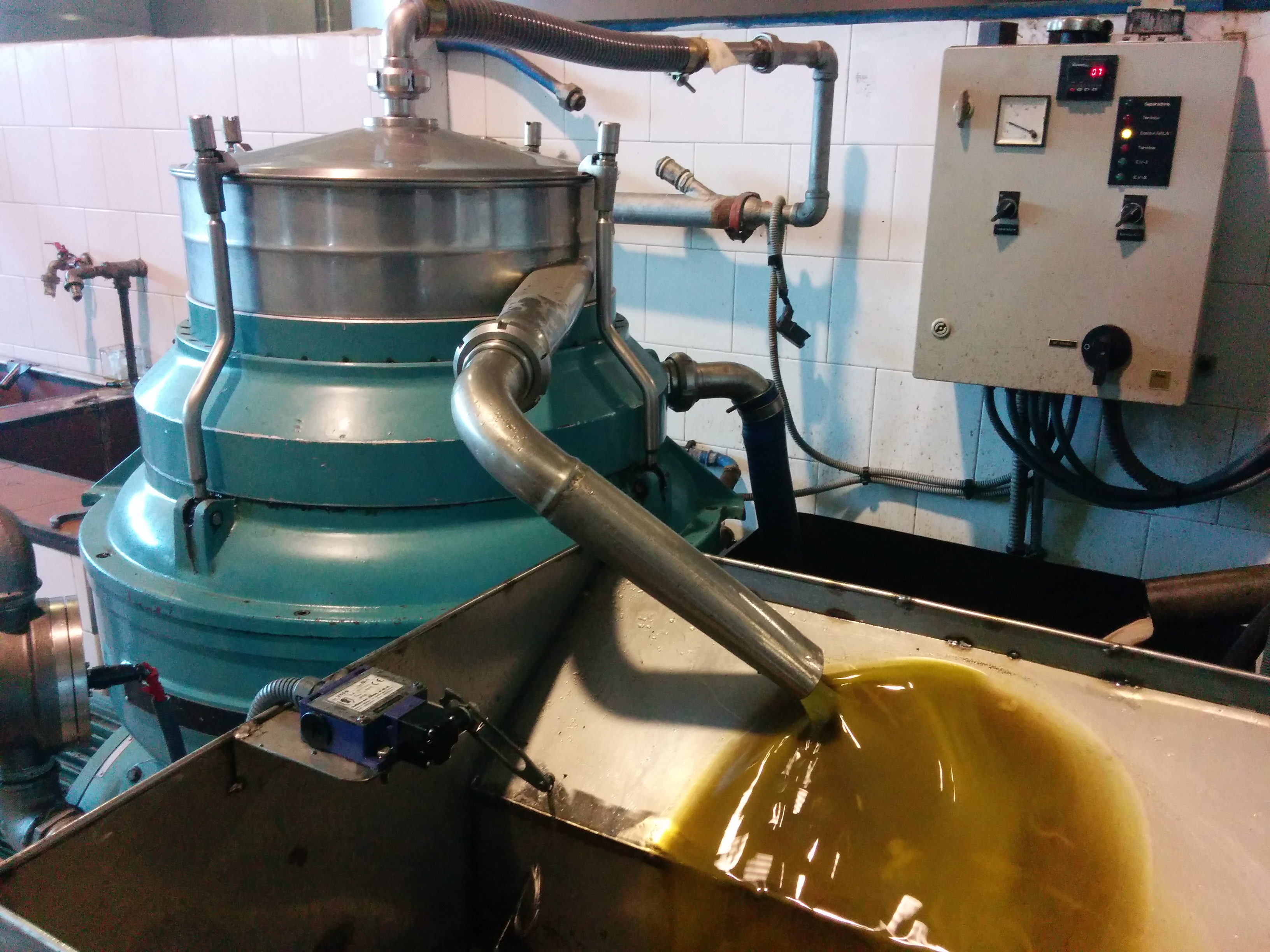 Aceite Oliva Molino Benamejí